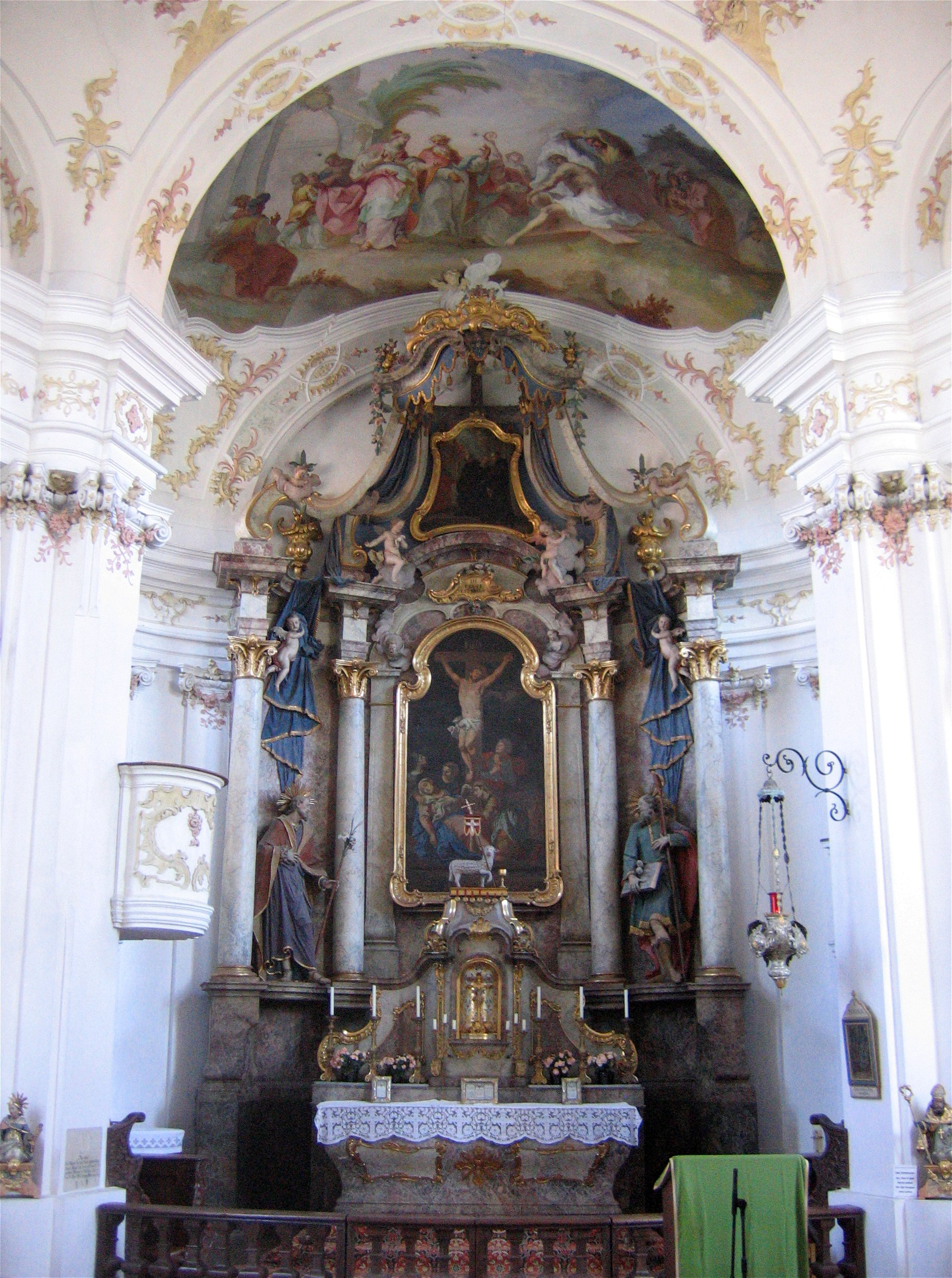 Hauptaltar der Heilig-Kreuz-Kirche, Berbling, Bad Aibling